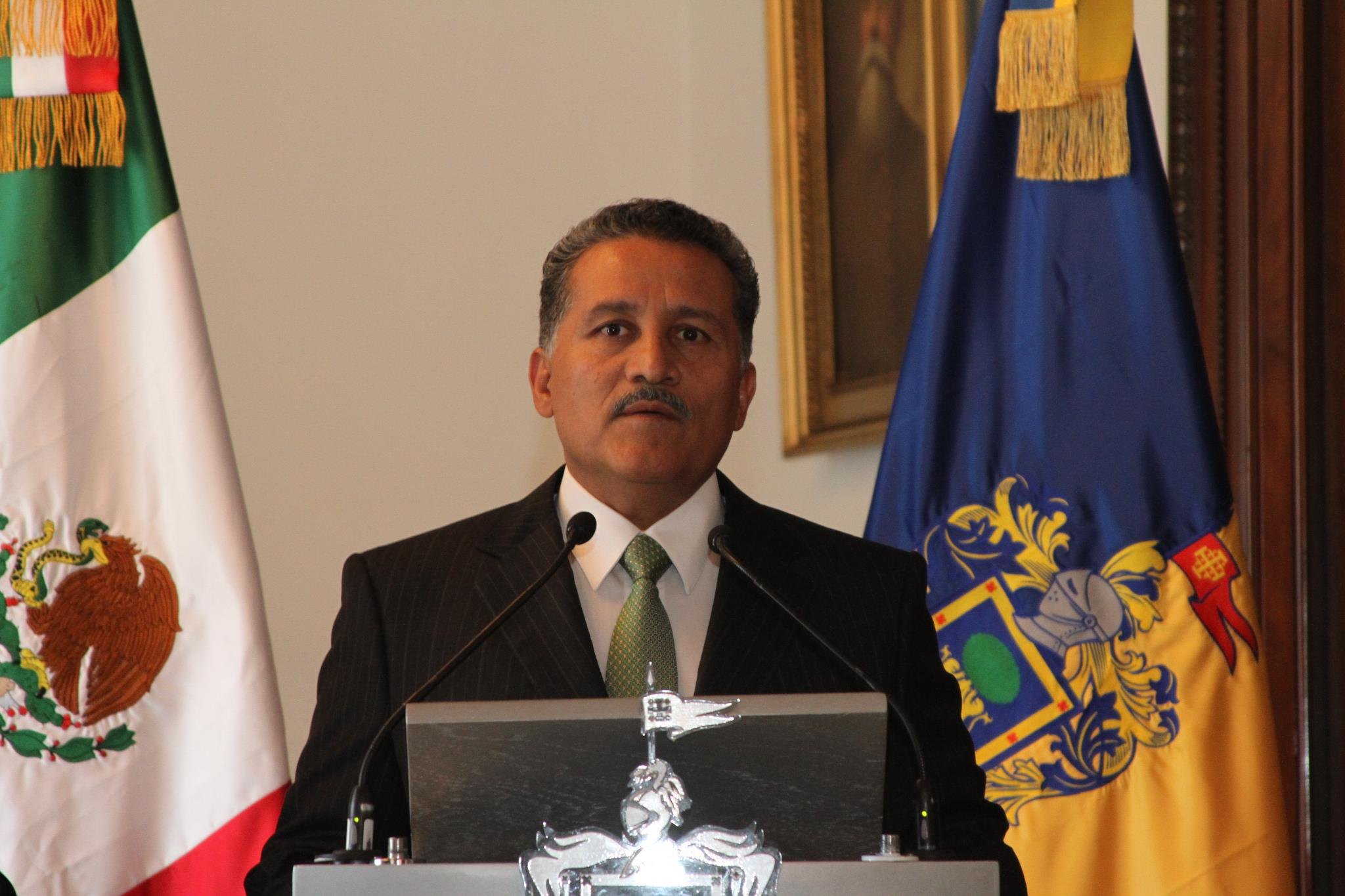 Arturo Zamora Jiménez